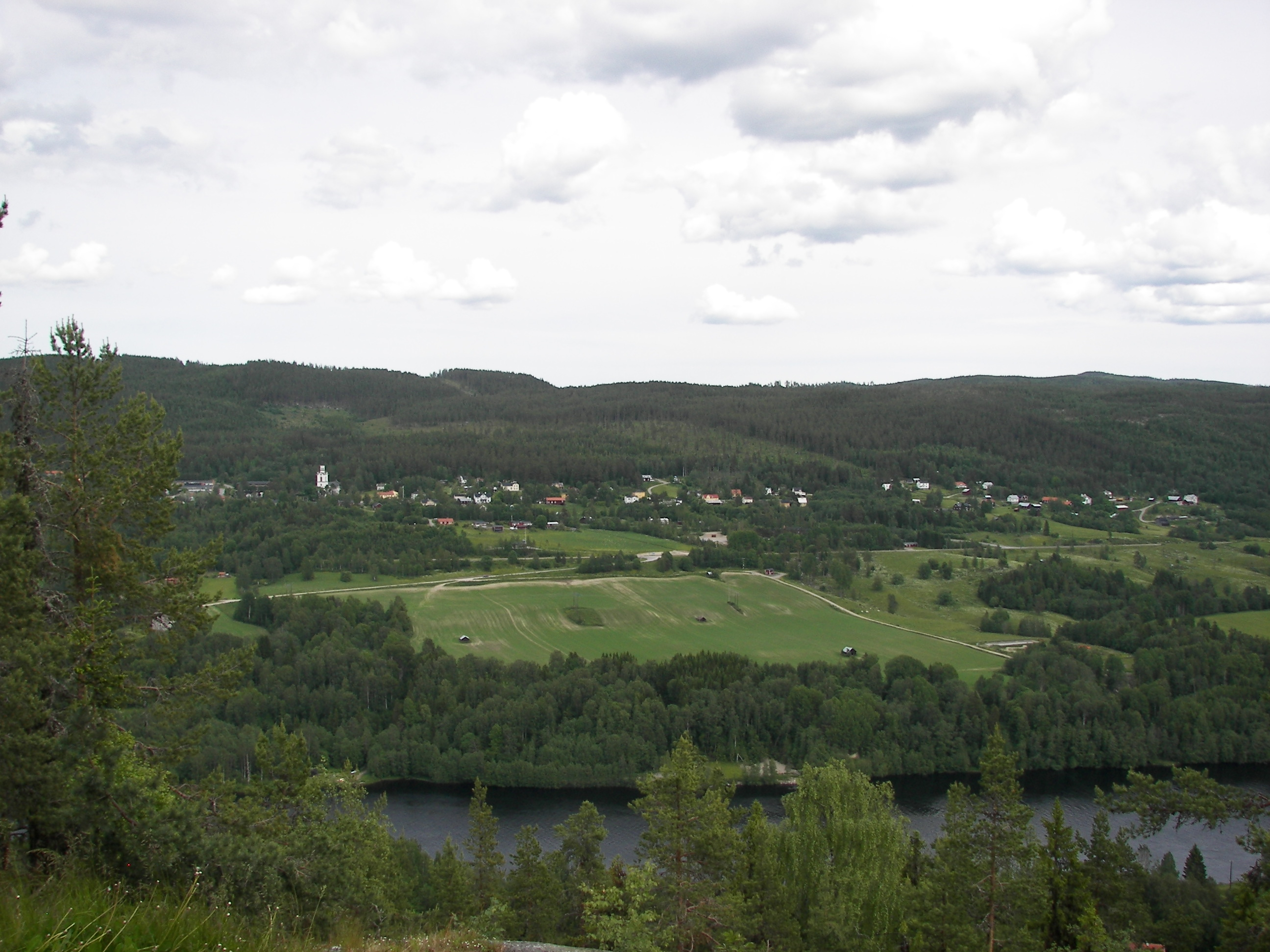 Liden sett från Vättaberget